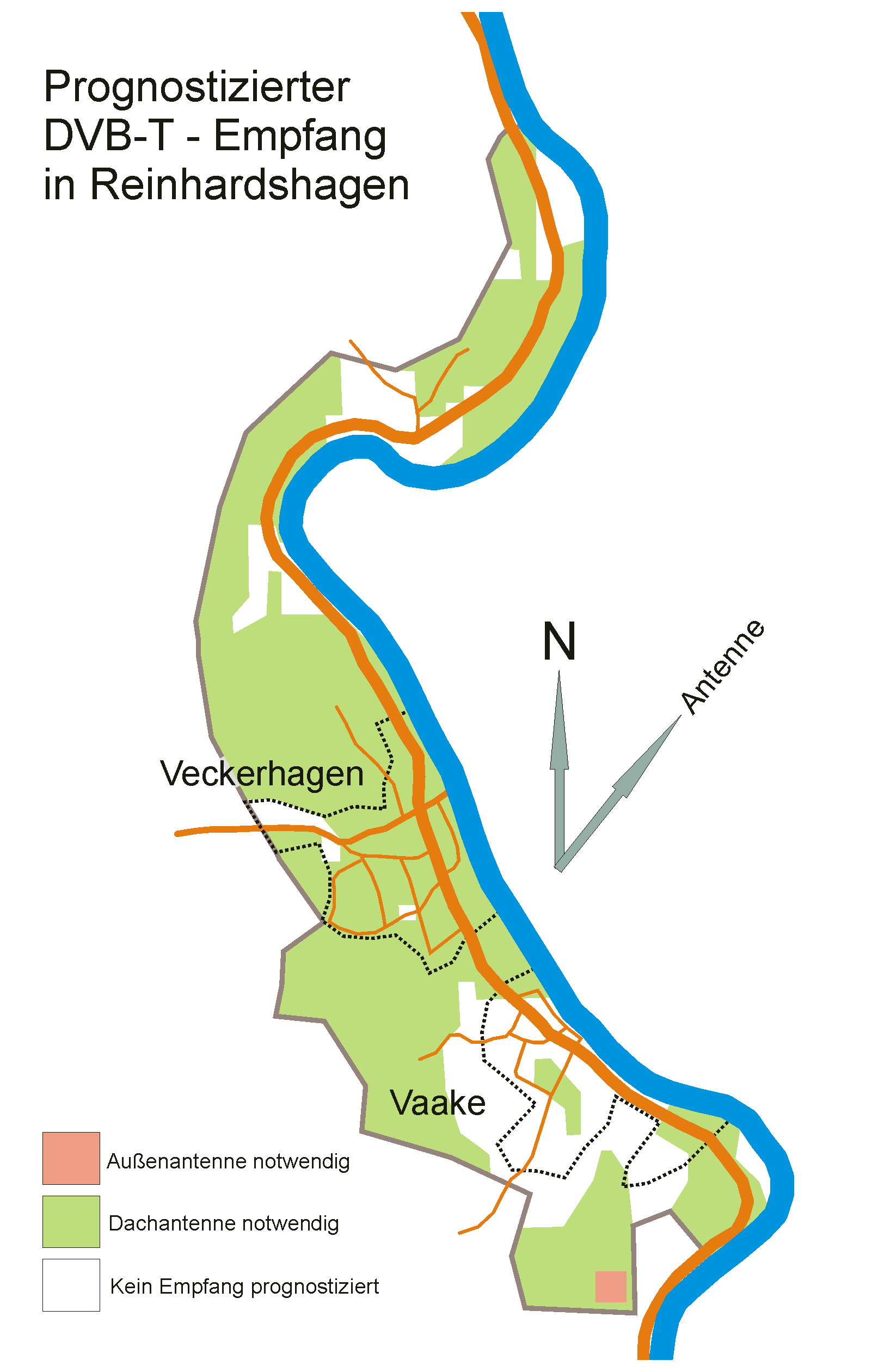 Prognostizierter DVB-T - Empfang in Reinhardshagen Quelle: Bundesamt für Kartographie und Geodäsie Zeichner: presse03 Datum: 07.06.2006 Sonstiges: Ausschnitt nach Originalkarte neu erstellt